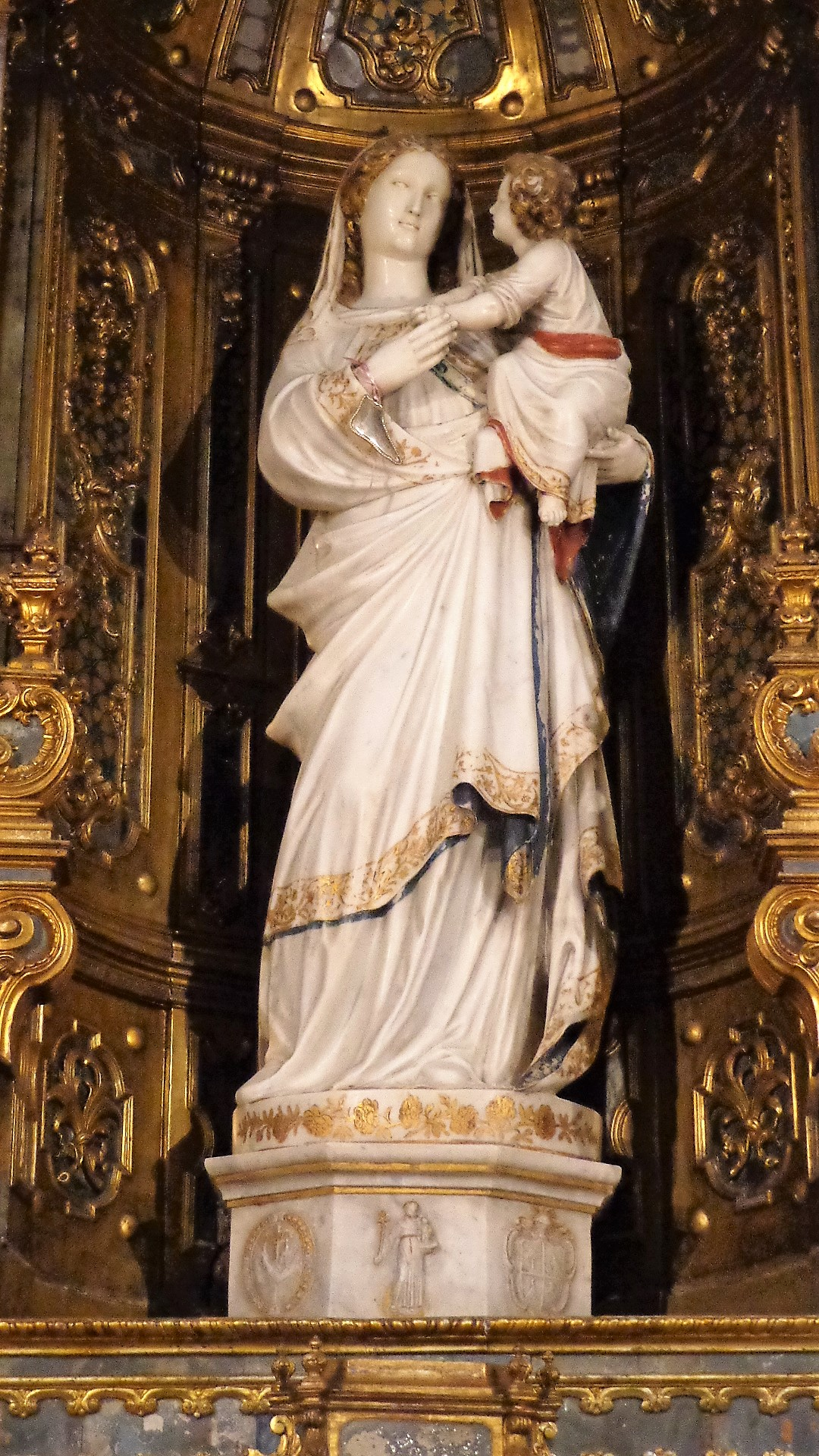 Statua Vergine